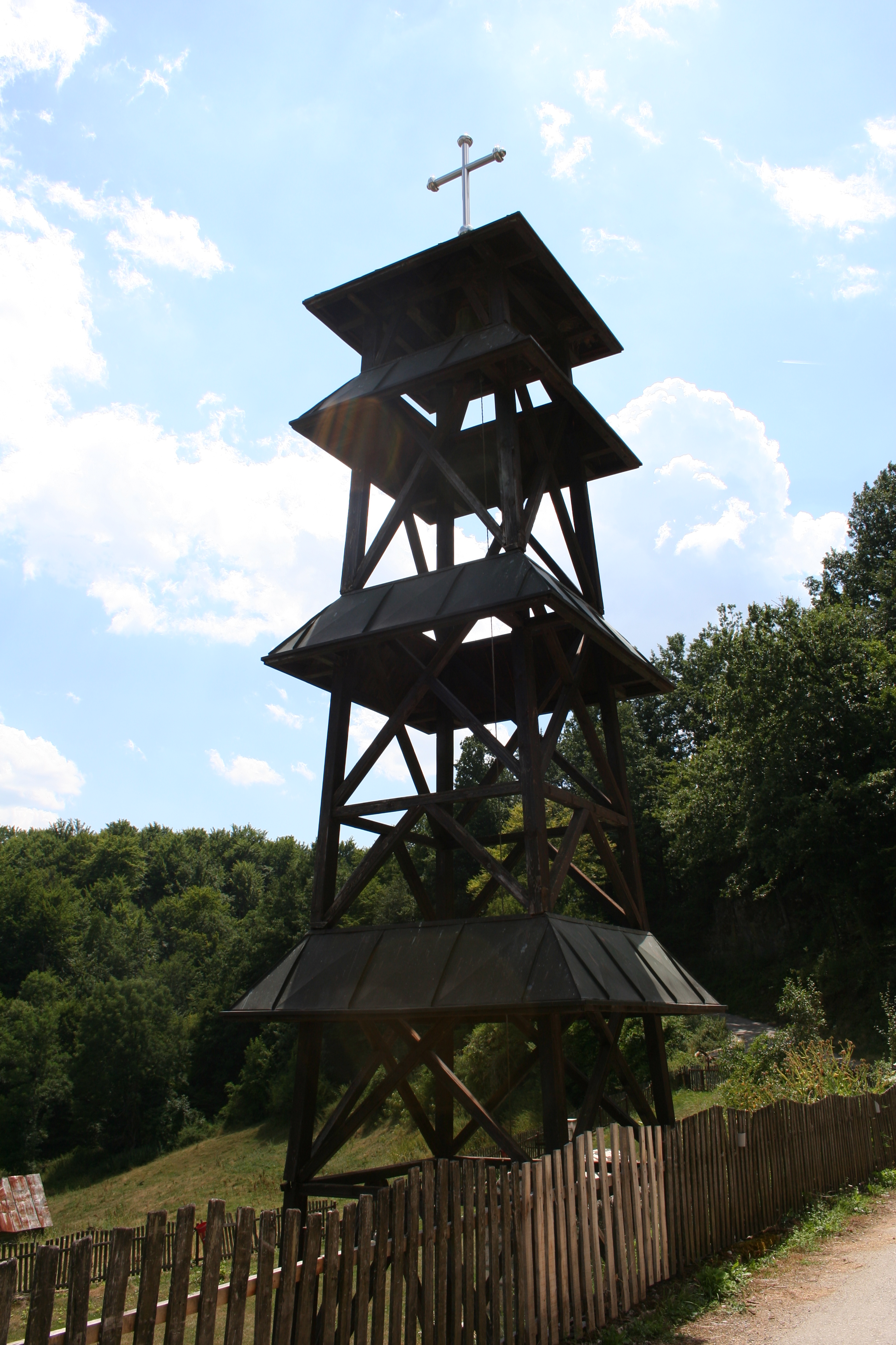 Crkva Sv. Gavrila u Staparima